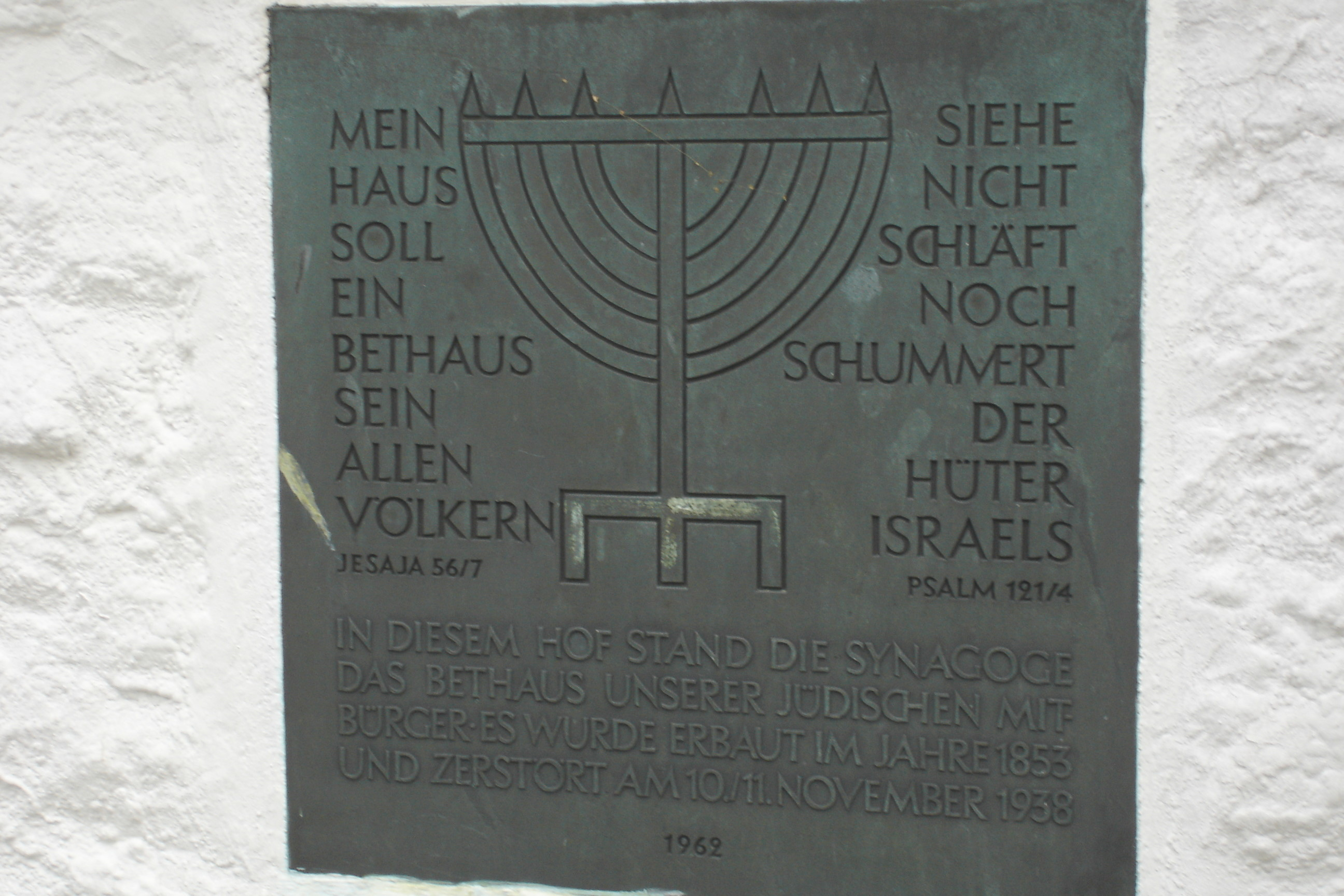 Gedenktafel der Berger Synagoge